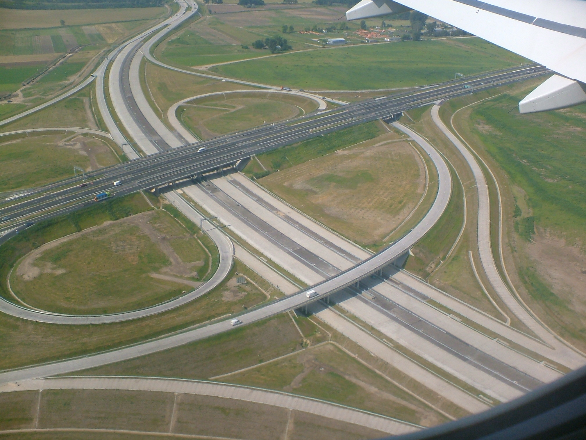 M0 - 4-es kereszteződése